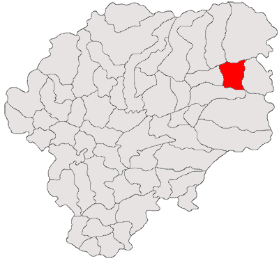 Categorie:Hărţi ale judeţului Bistriţa-Năsăud